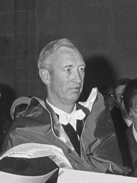 Uitreiking eredoctoraten in Rijksuniversiteit Utrecht, 19 april 1966